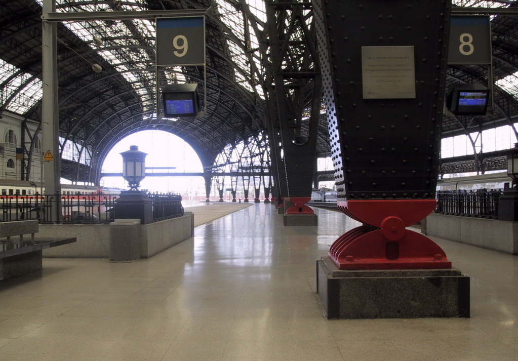 Estació de França de Barcelona